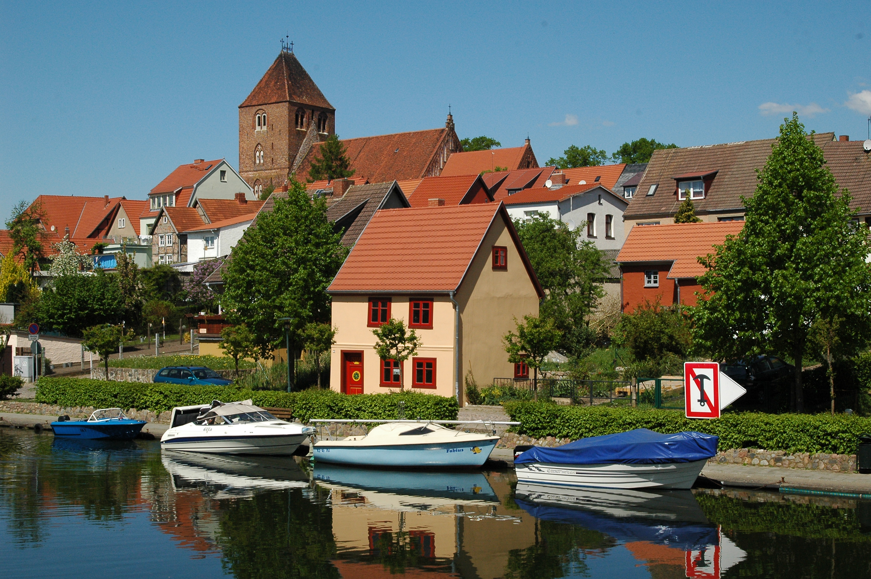 Plau am See, malerische Stadt, hier Szene an der Elde, Mecklenburg-Vorpommern